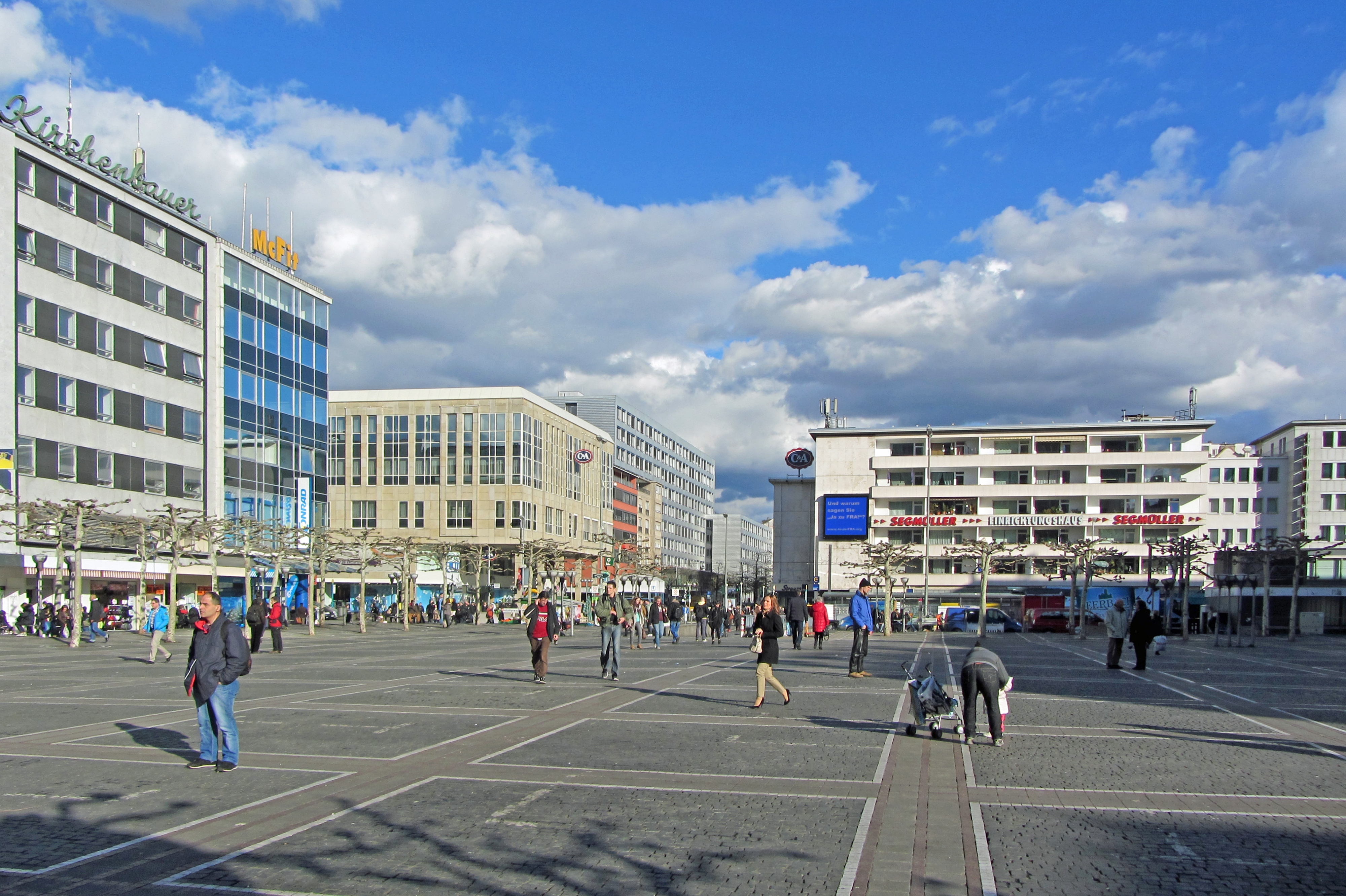 Die Konstablerwache